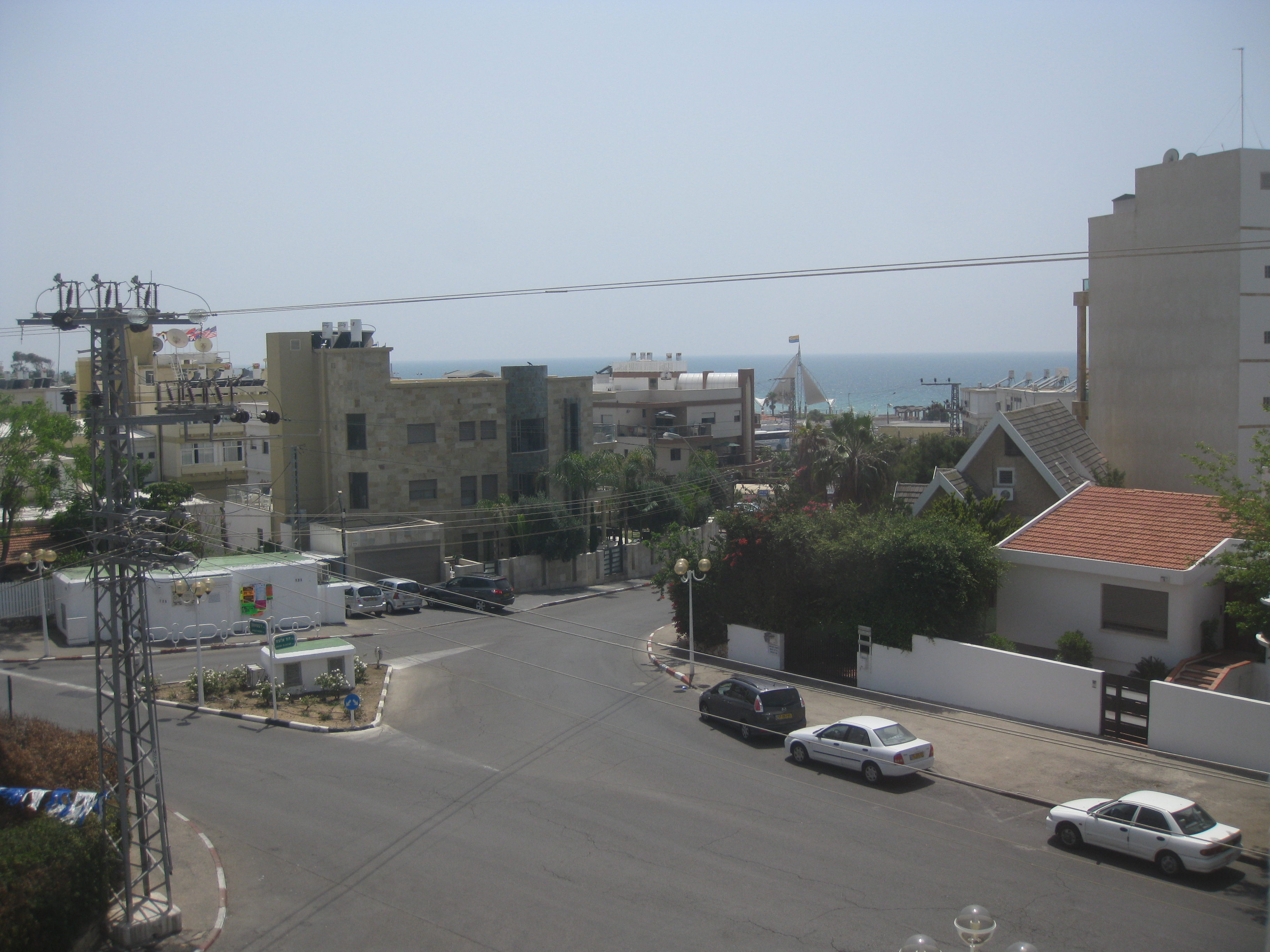 Nahariyya - View from the Water Tower נהריה נוף ממגדל המים ההיסטורי של נהריה